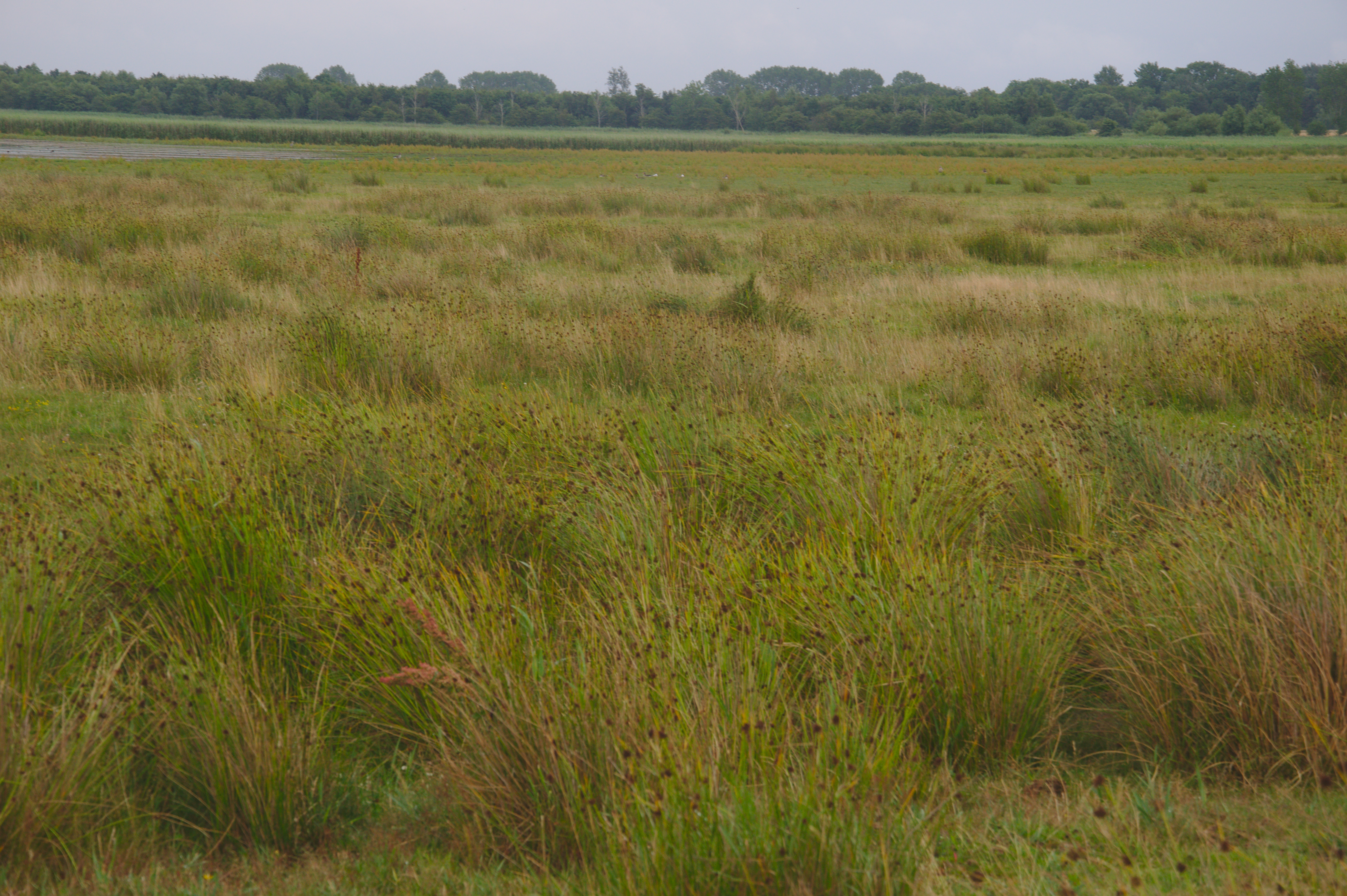 Grünland des Nabu Wasservogelreservates Wallnau Fehmarn.